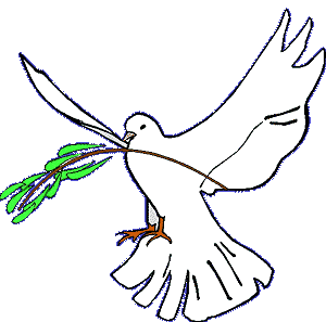 seamos agentes de la paz en el mundo...!